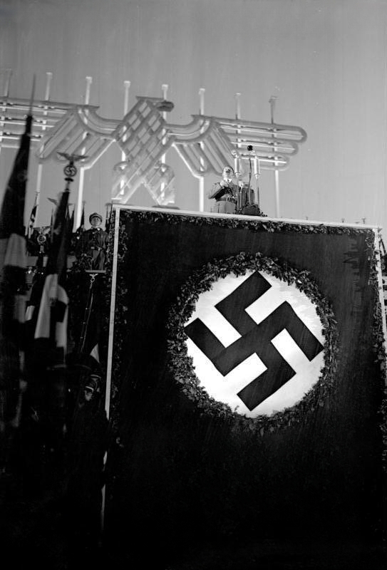 Parteitag der NSDAP in Nürnberg 1934. Der Führer spricht auf dem Appell der Amtswalter auf der Zeppelinwiese.